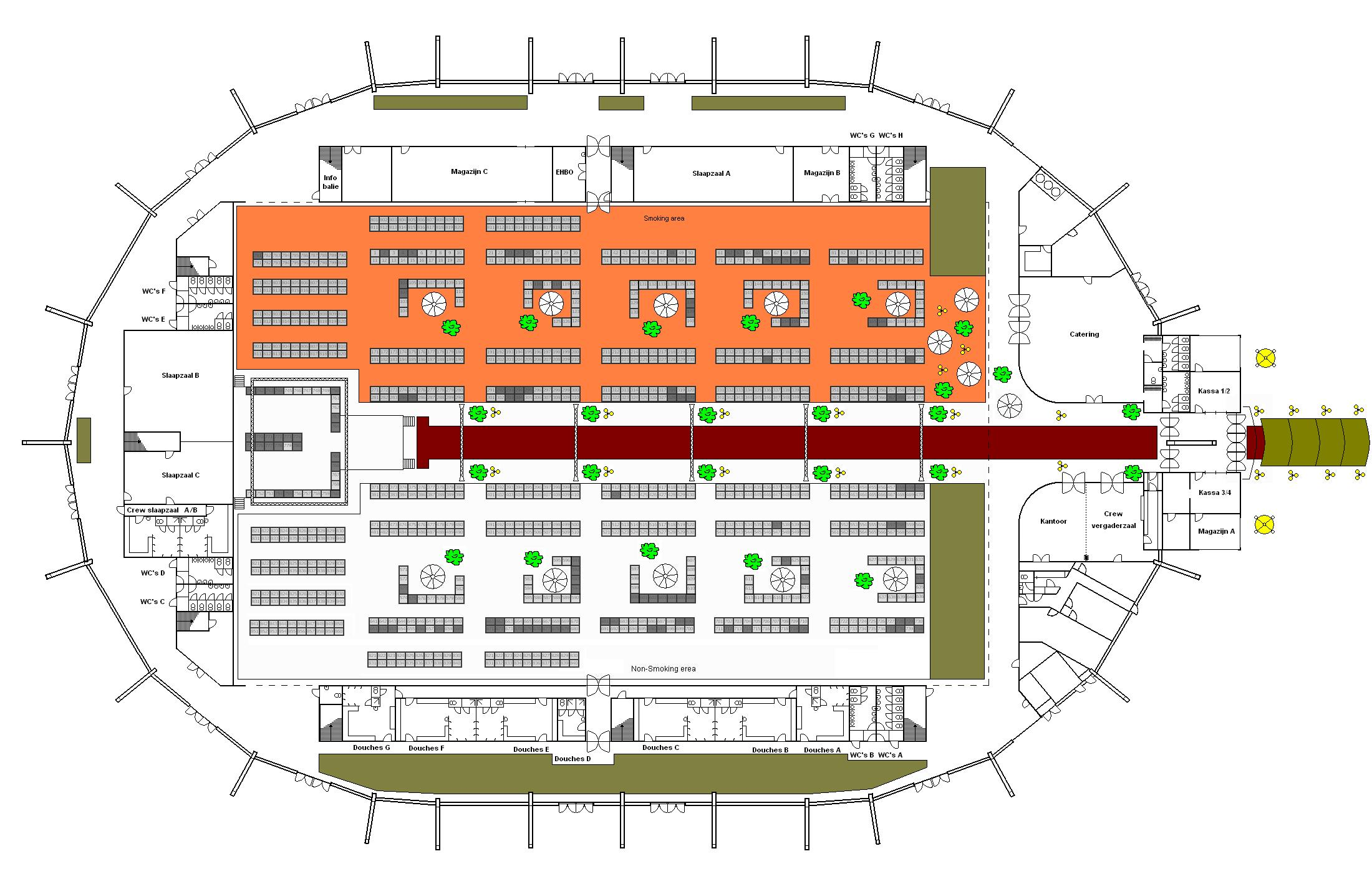 Afbeelding van LAN = LIFE 5 plattegrond